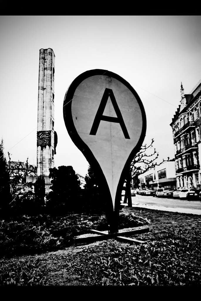 Sign of Go...ogle!